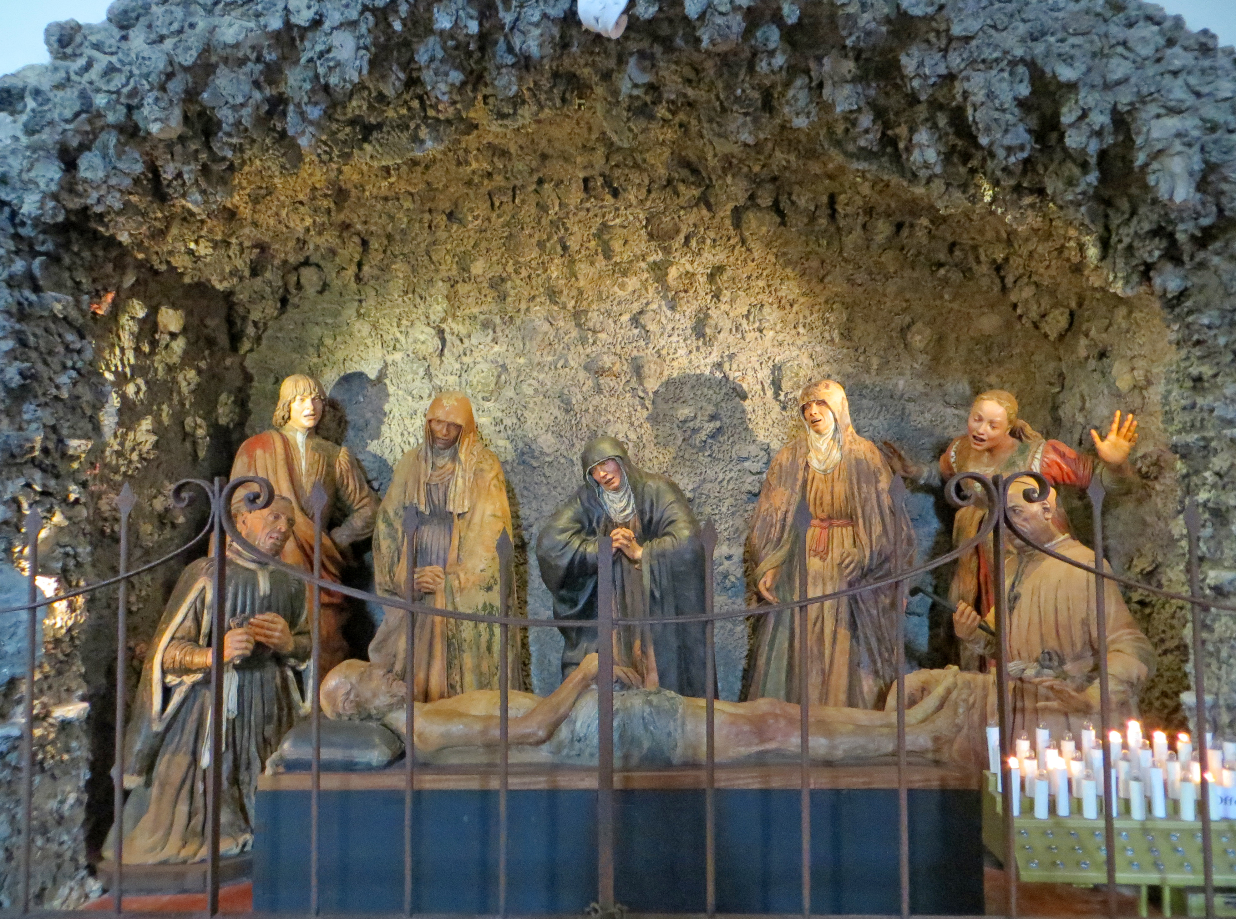 Chiesa di Santa Maria degli Angeli (Busseto) - Compianto sul Cristo Morto